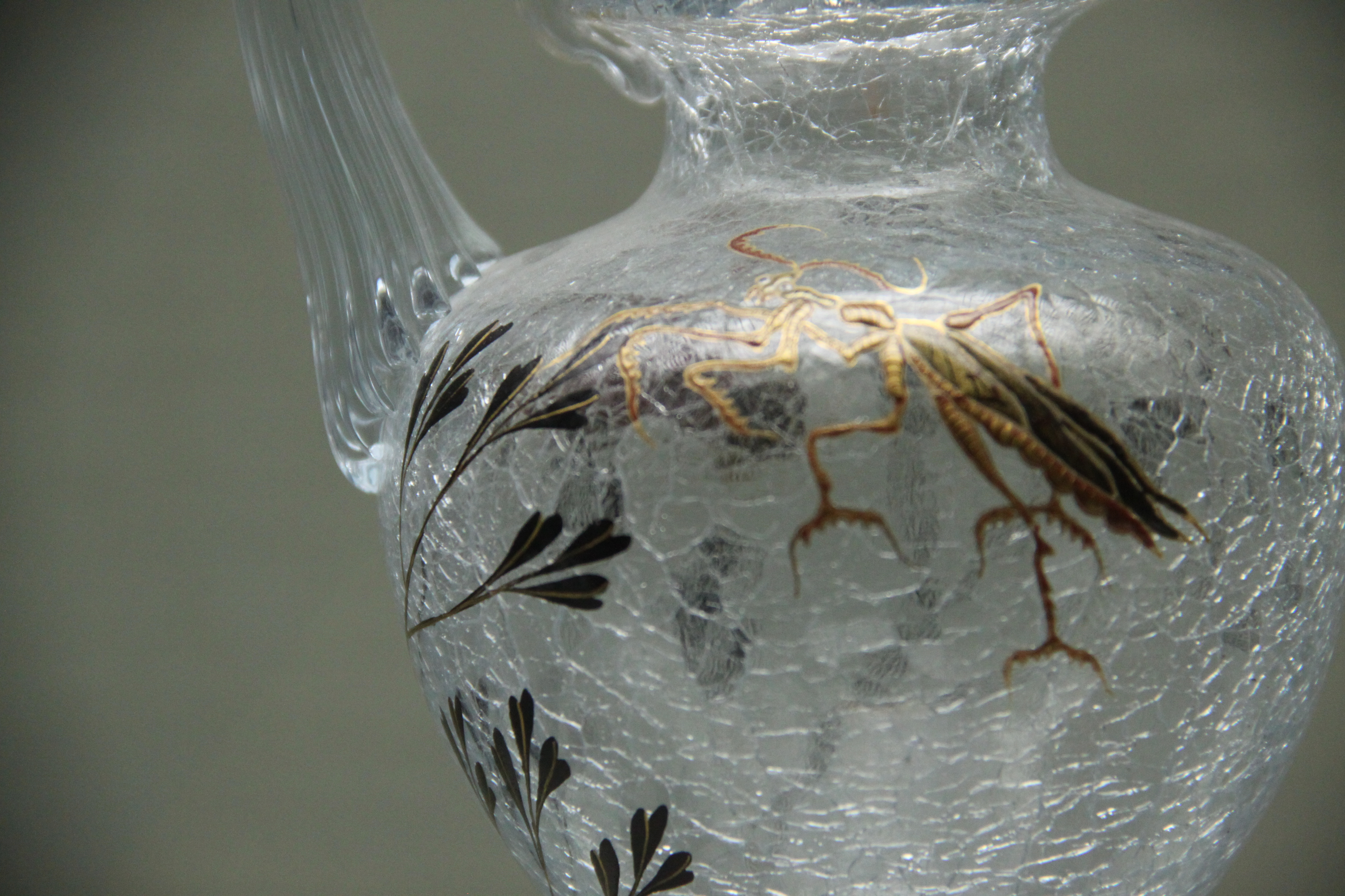 Émile Gallé (1846 - 1904) Petit vase craquelé, vers 1880 Décor de mante religieuse sur une face et de cigale sur l'autre Signature sous la pièce E.Gallé/à/Nancy Verre clair de lune, craquelures, émaux, application Achat avec l'aide du Fonds Régional d'Acquisition des Musées de Lorraine, 1989 (inv. 989.1.1)